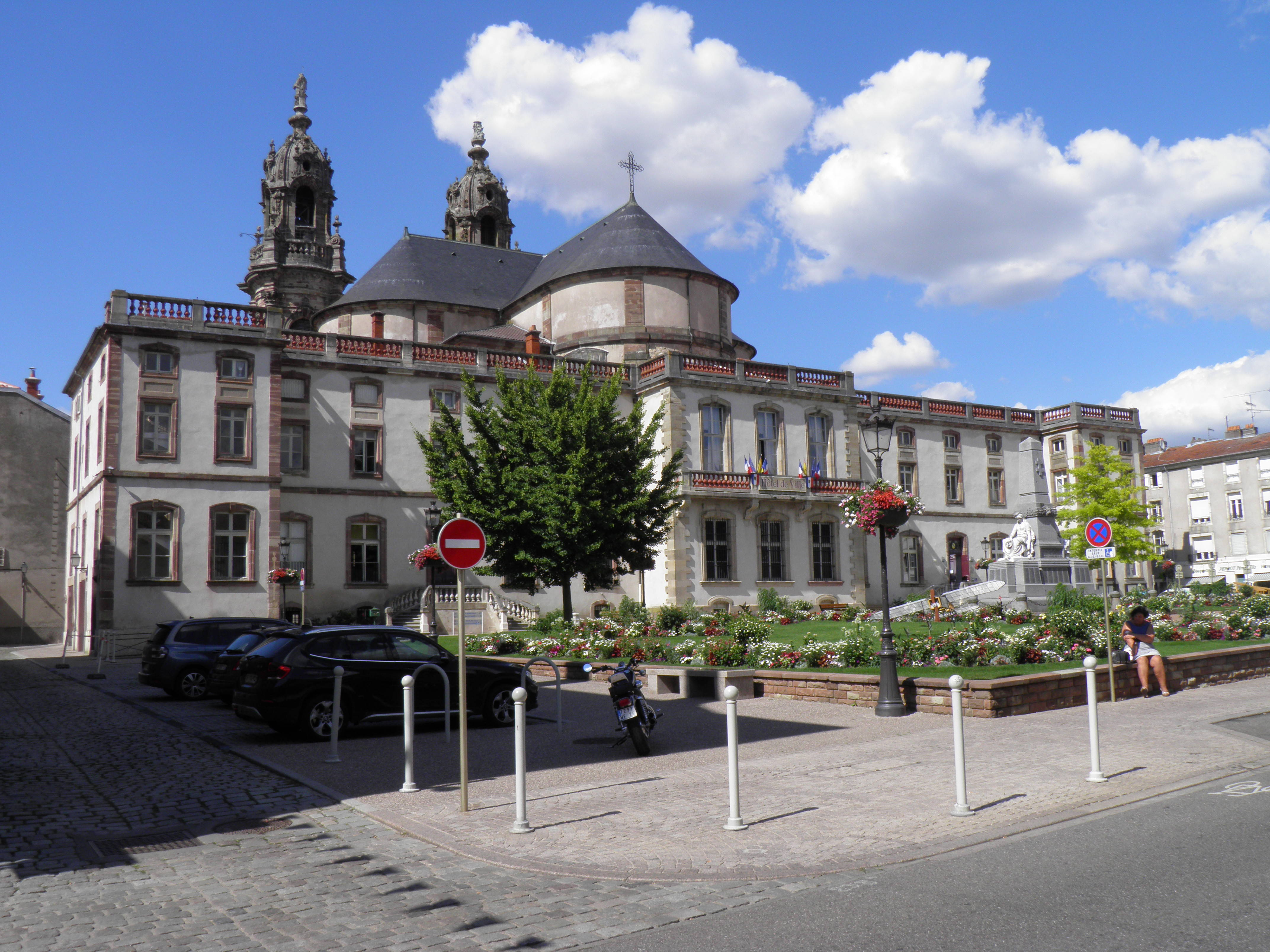 Hôtel de ville de Lunéville (Meurthe-et-Moselle, France).